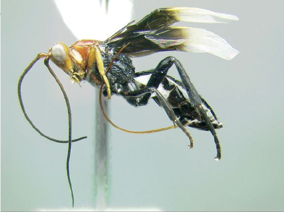 Biroia sp.